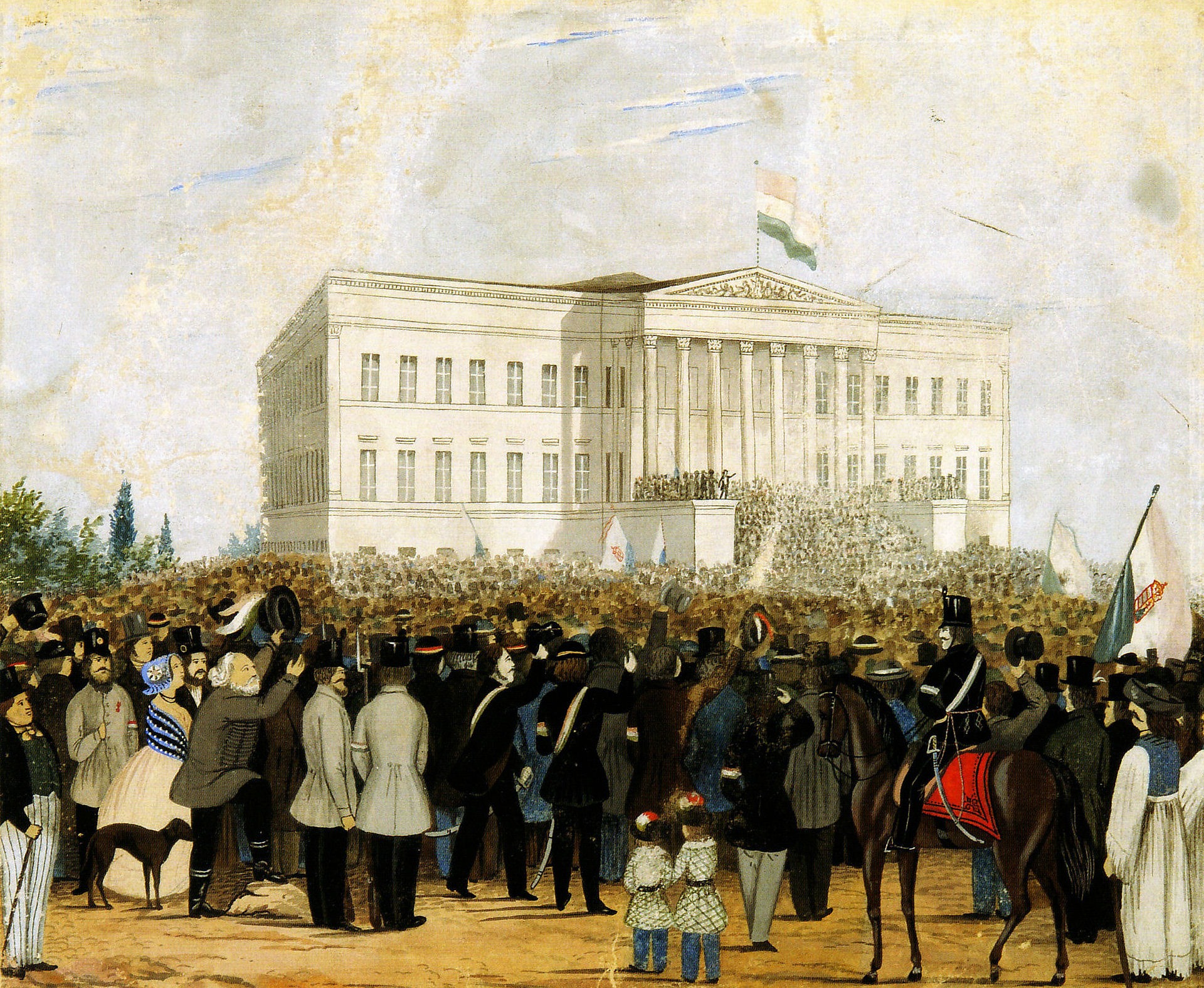 Petőfi Sándor a Nemzeti dalt szavalja a Nemzeti Múzeum lépcsőjén. Ismeretlen művész akvarellje